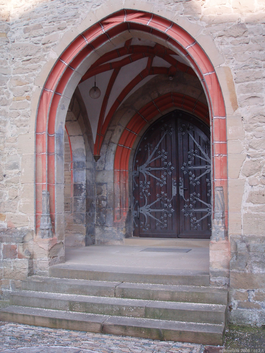 Kath. Pfarrkirche Unsere Liebe Frau in Eppingen, Vorhalle